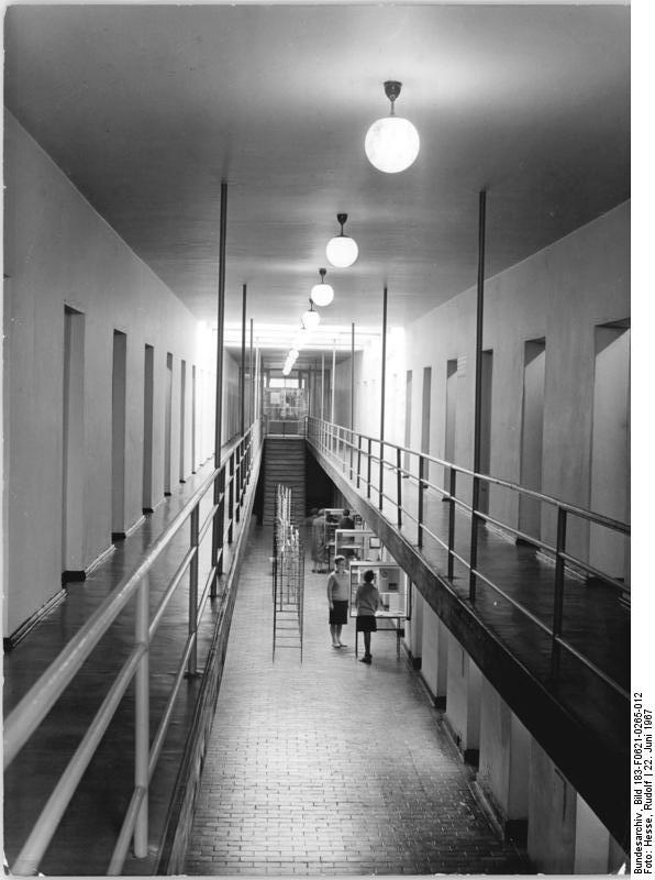 Mahn- und Gedenkstätte Ravensbrück, Zellen Zentralbild Hesse 22.6.1957 Ravensbrück-Fürstenberg. Die Nationale Mahn- und Gedenkstätte Ravensbrück wurde auf einen Teil des ehemaligen Konzentrationslagers errichtet. Zum Gedenken an den heldenhaften Kampf der über 139000 hier eingekerkerten Frauen und Mädchen, an den bitteren Tod der 92.000 Ermordeten und den Lebenden zur Mahnung wurde ein Museum eingerichtet. UBz: Blick auf den Kontrollgang mit Zellenbau, der in ein Museum umgestaltet wurde. [Mahn- und Gedenkstätte für das Konzentrationslager Ravensbrück, Zellenbau im Arrestgebäude]